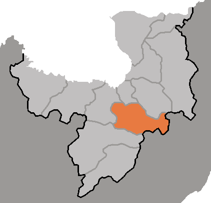 Map of Kapsan, Ryanggan-do, DPRK, 2006